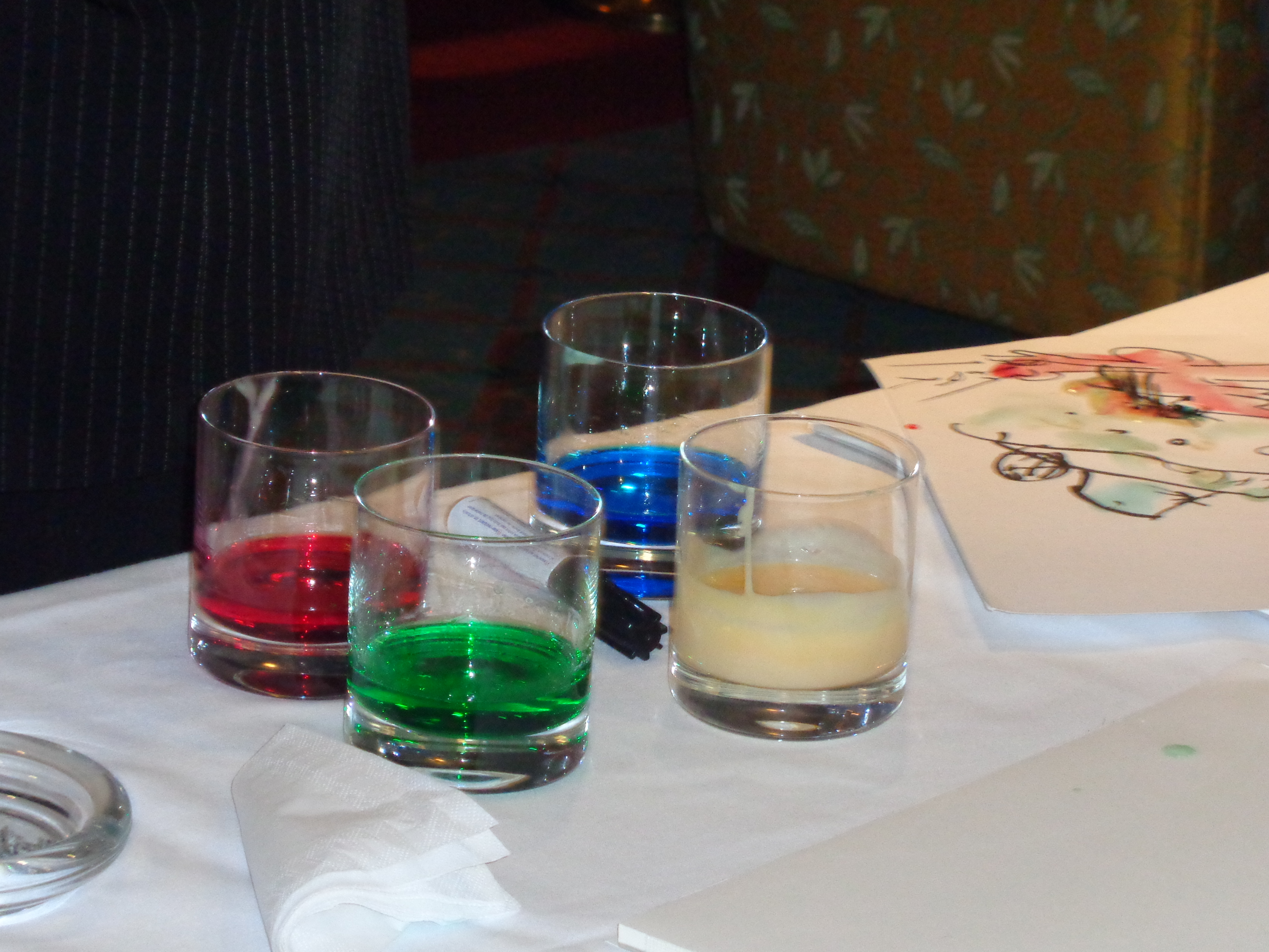 Udo Lindenbergs „Likörelle“ auf MS Deutschland